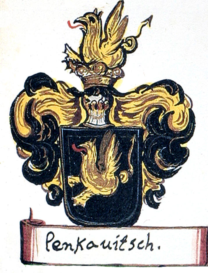 Grb Ivana Lenkoviča